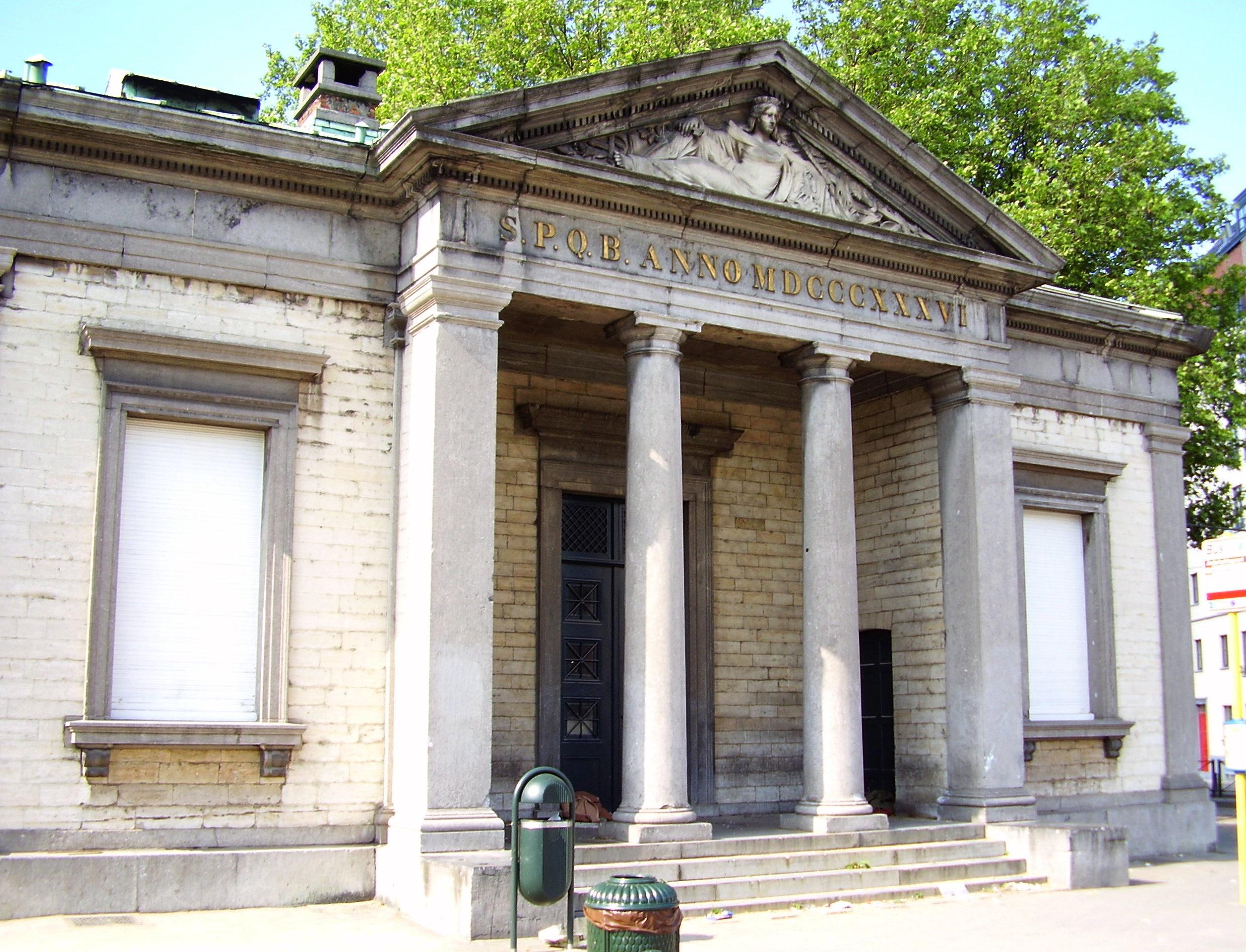 Description: L'un des deux anciens pavillons d'octroi, porte d'Anderlecht, Bruxelles - aujourd'hui accès au musée des égouts Author: User:Ben2 Date of creation: 06 juin 2006 Source: Photo personnelle